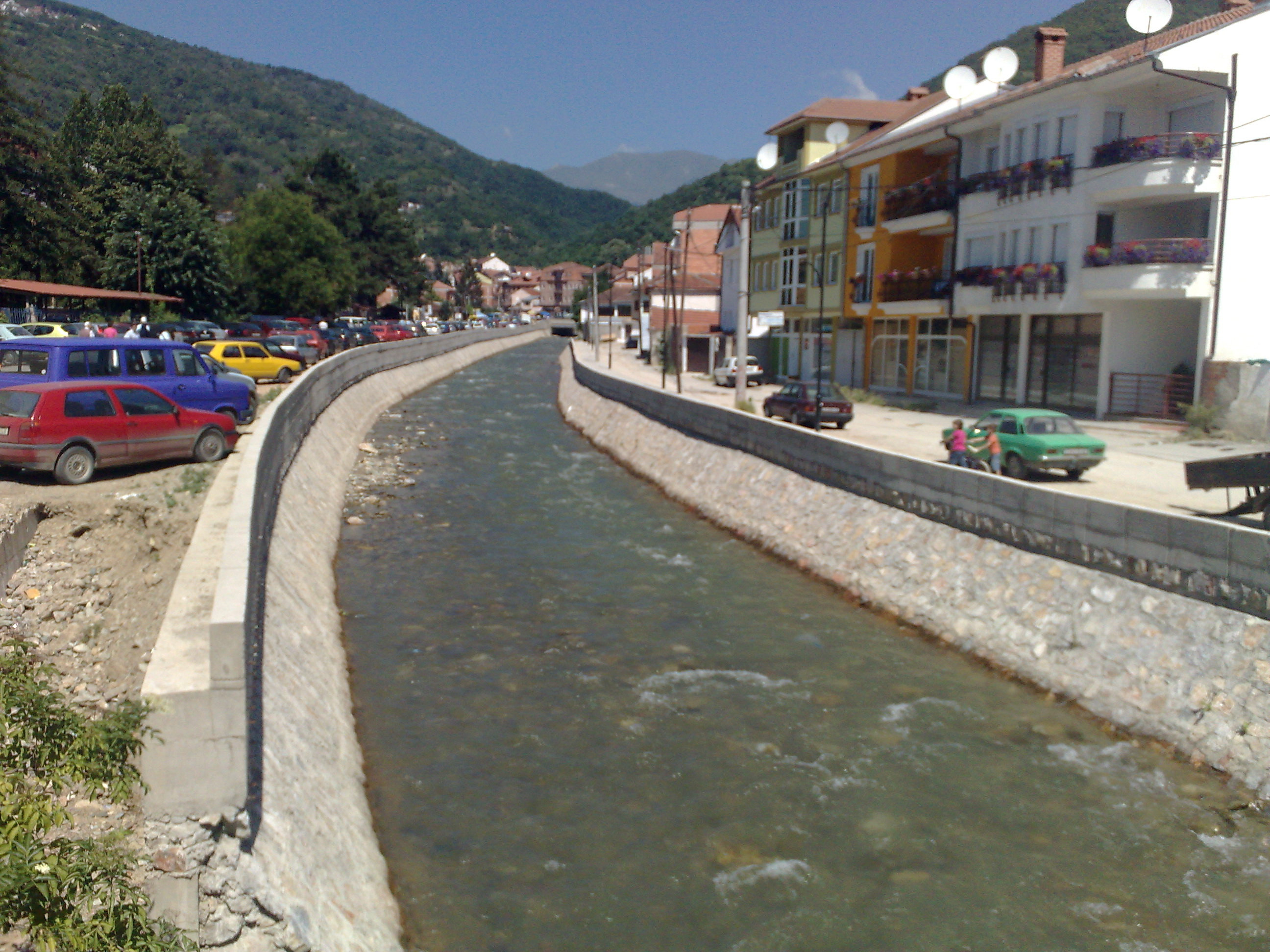 Тетово. Горна Чаршија